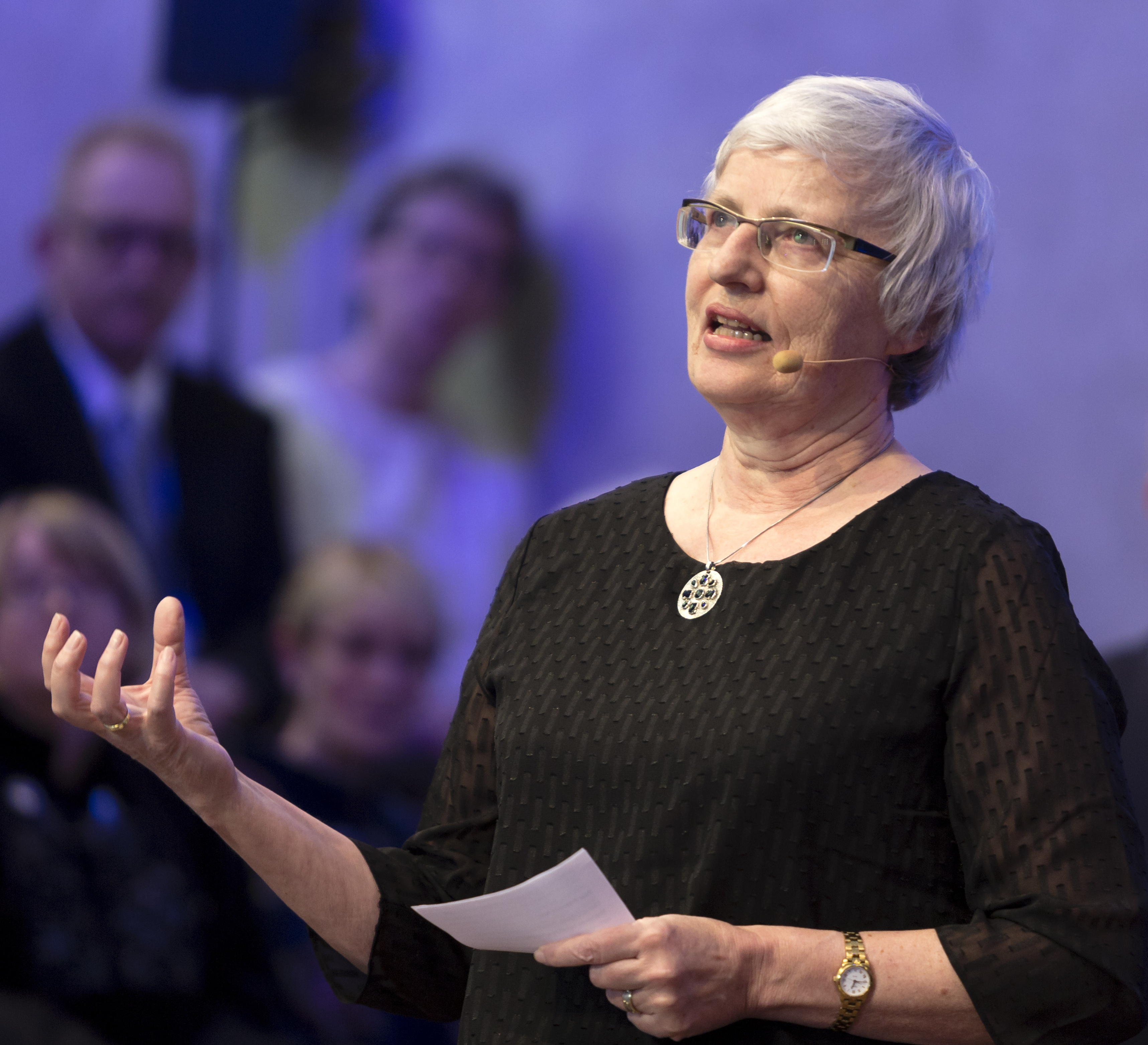 Trondheim 11.03.2016 : NTNU har festmøte i aulaen, Hovedbygningen. Promovering av doktorer og æresdoktorene språkforsker Artemis Alexiadou og fysiker Miguel Rubi. Forslagsstiller professor Signe Kjelstrup.